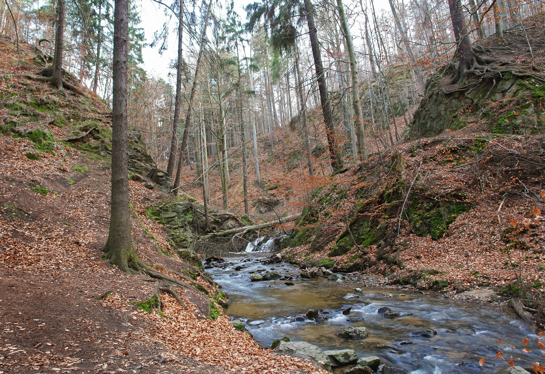 Prießnitz-Wasserfall, Naturdenkmal Nr. 6 in Dresden